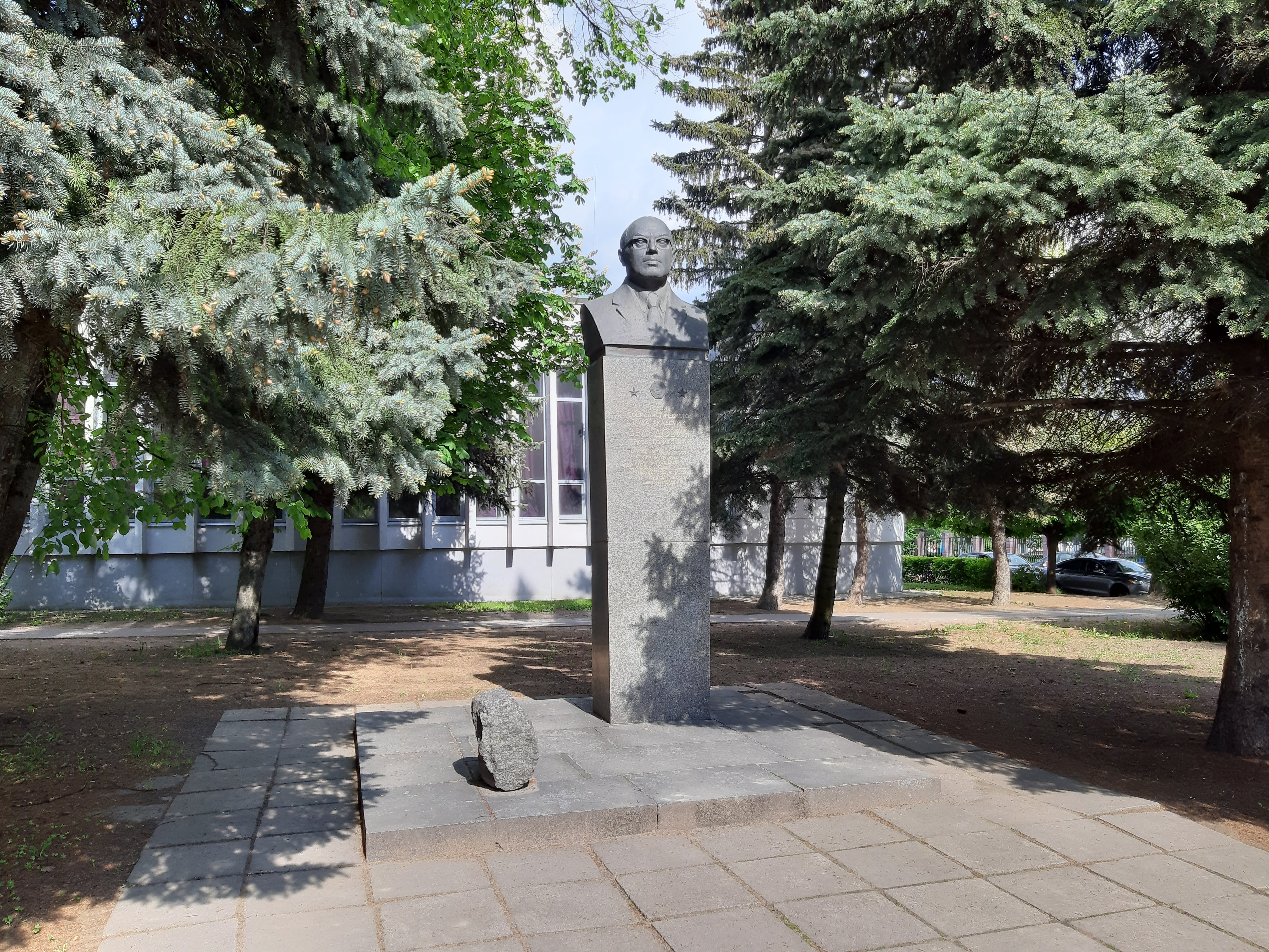 Мінск. Па Сурганава ў маі 2019